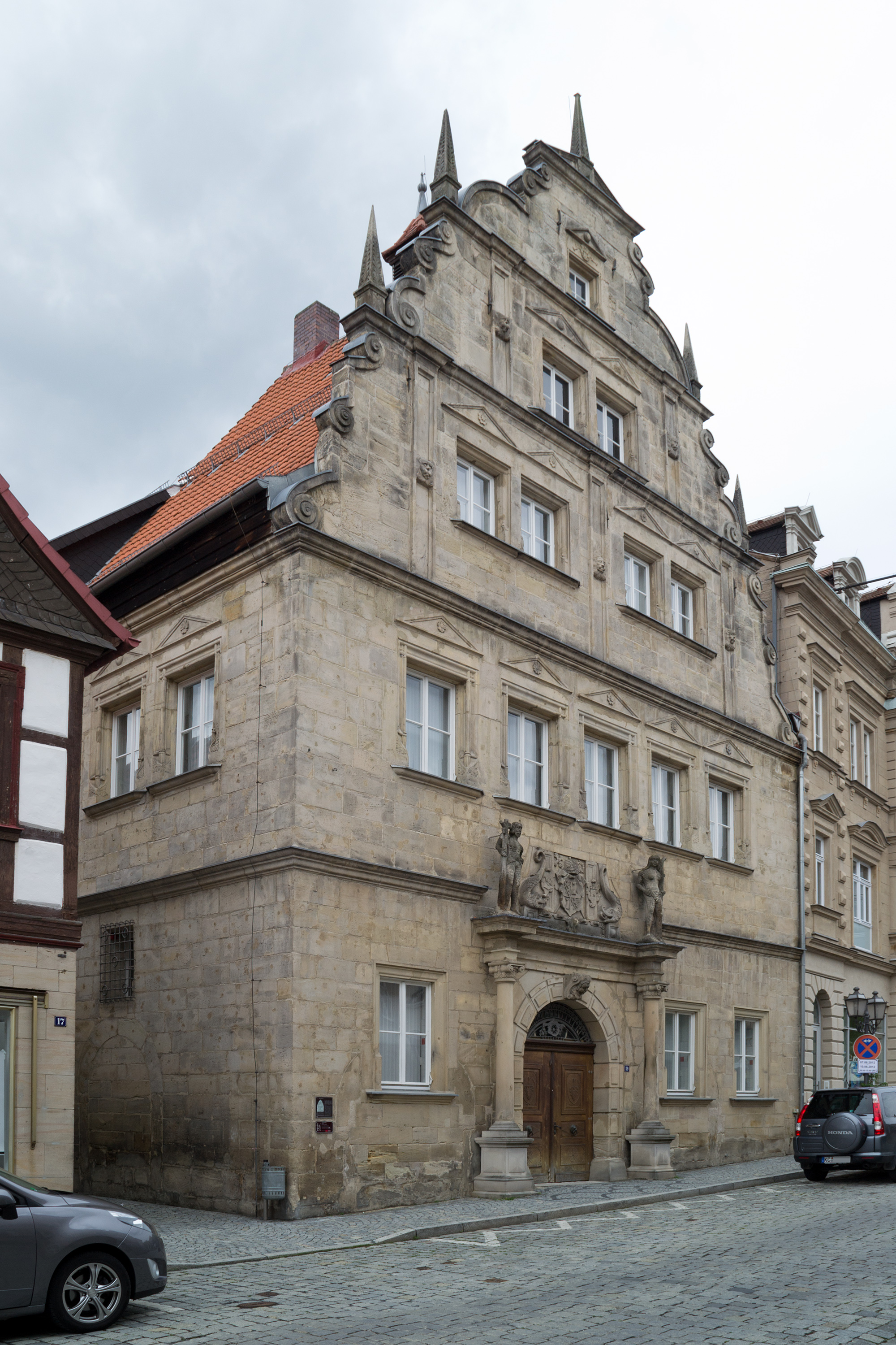 Historisches Altes Rathaus in der Lucas-Cranach-Straße in Kronach.